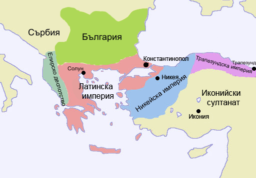 Балканите след Четвъртия кръстоносен поход.